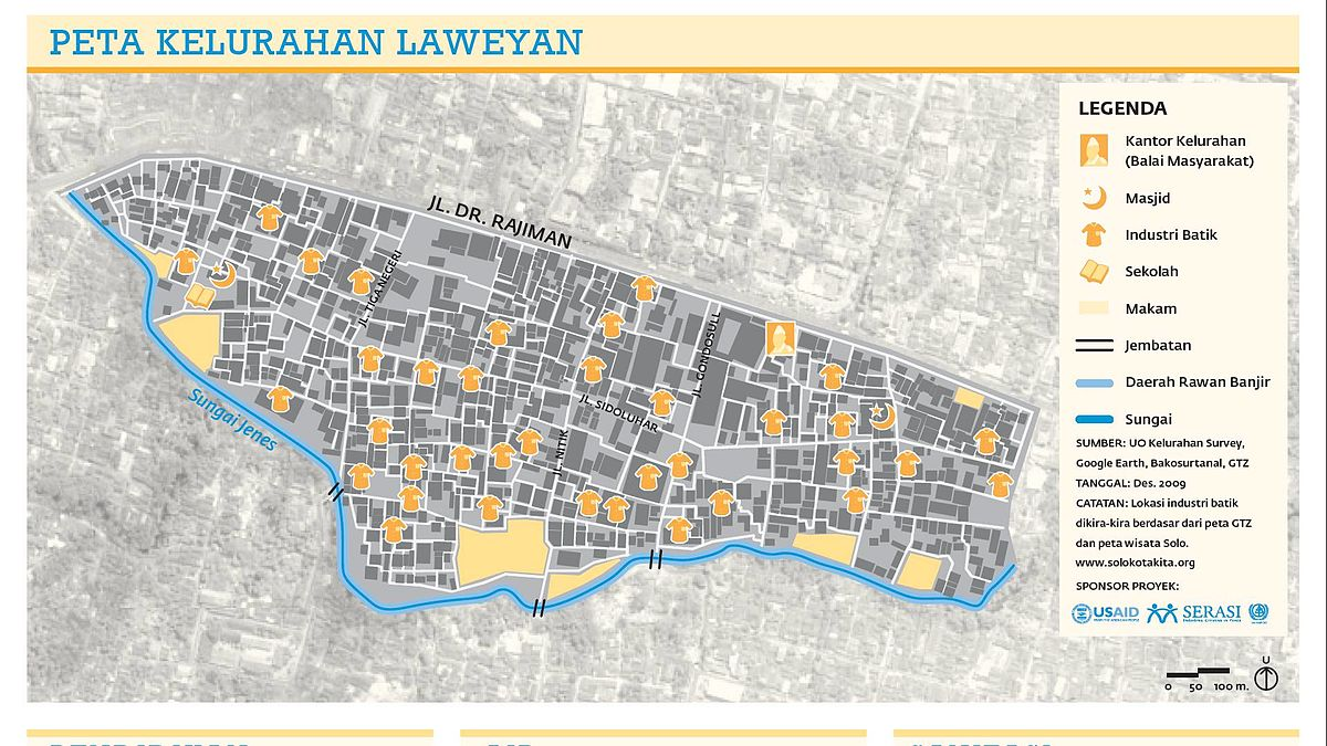 Plan du kelurahan (village administratif) de Laweyan dans le kecamatan (district) du même nom à Surakarta, Java central, Indonésie